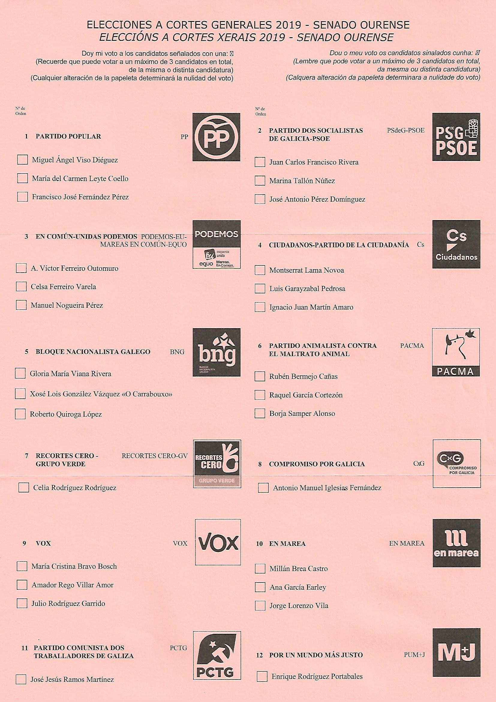 Eleccions Senado de España 2019 Ourense